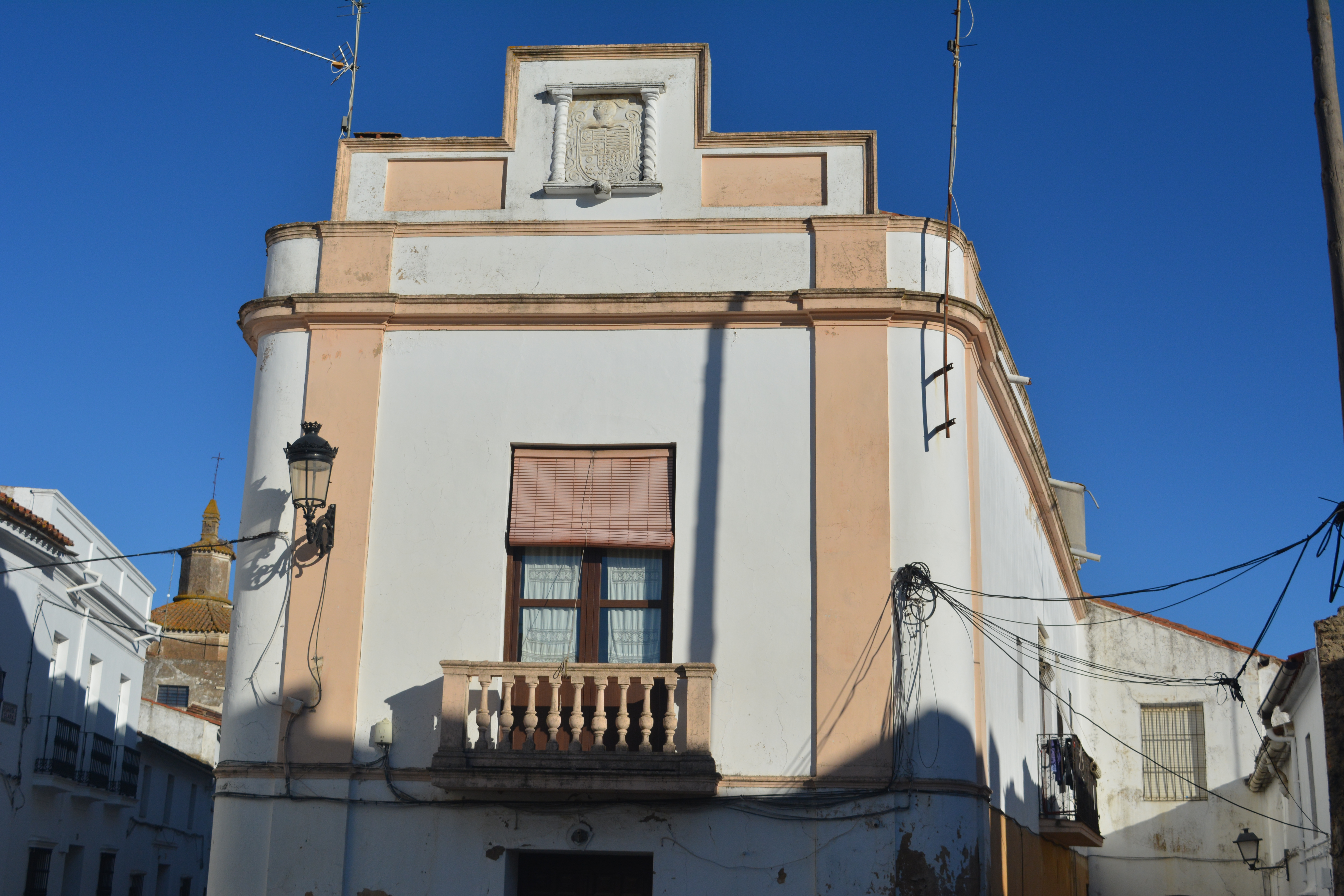 Fregenal de la Sierra (Badajoz). Vista parcial de la vivienda de la calle Santa Clara, antigua sede del instituto de segunda enseñanza de la localidad.